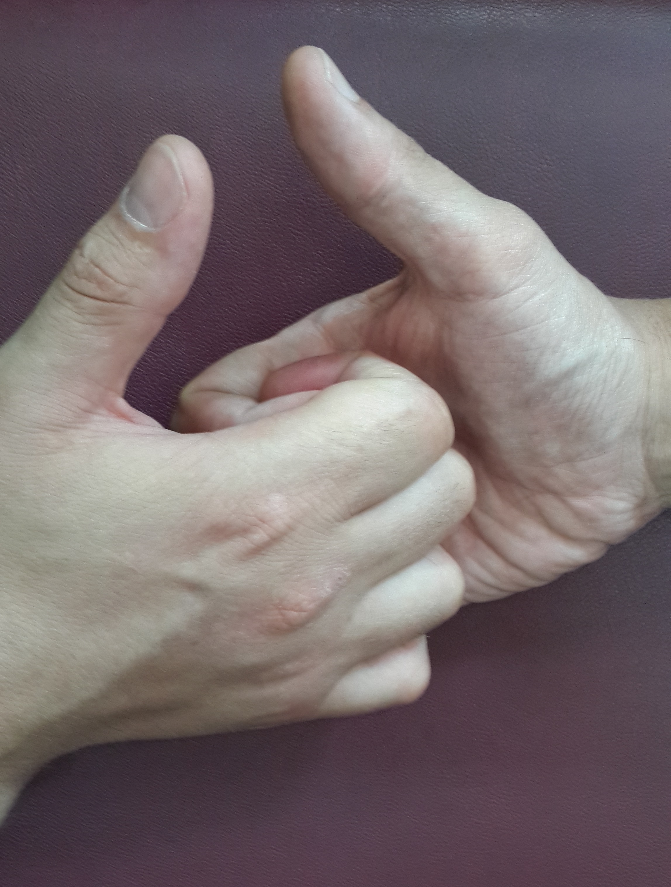 Position initiale